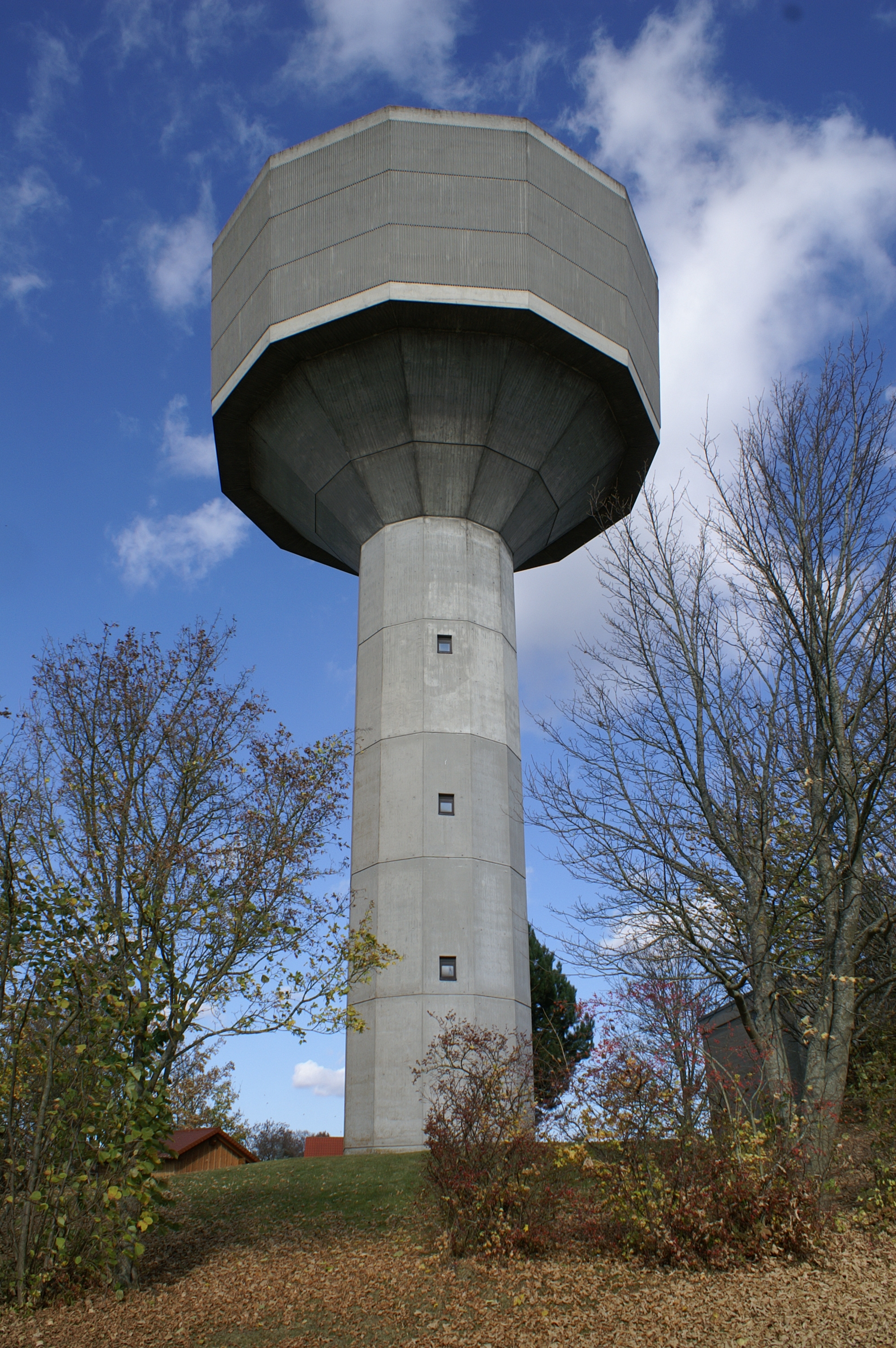 Wasserturm in Machtolsheim auf der Schwäbischen Alb